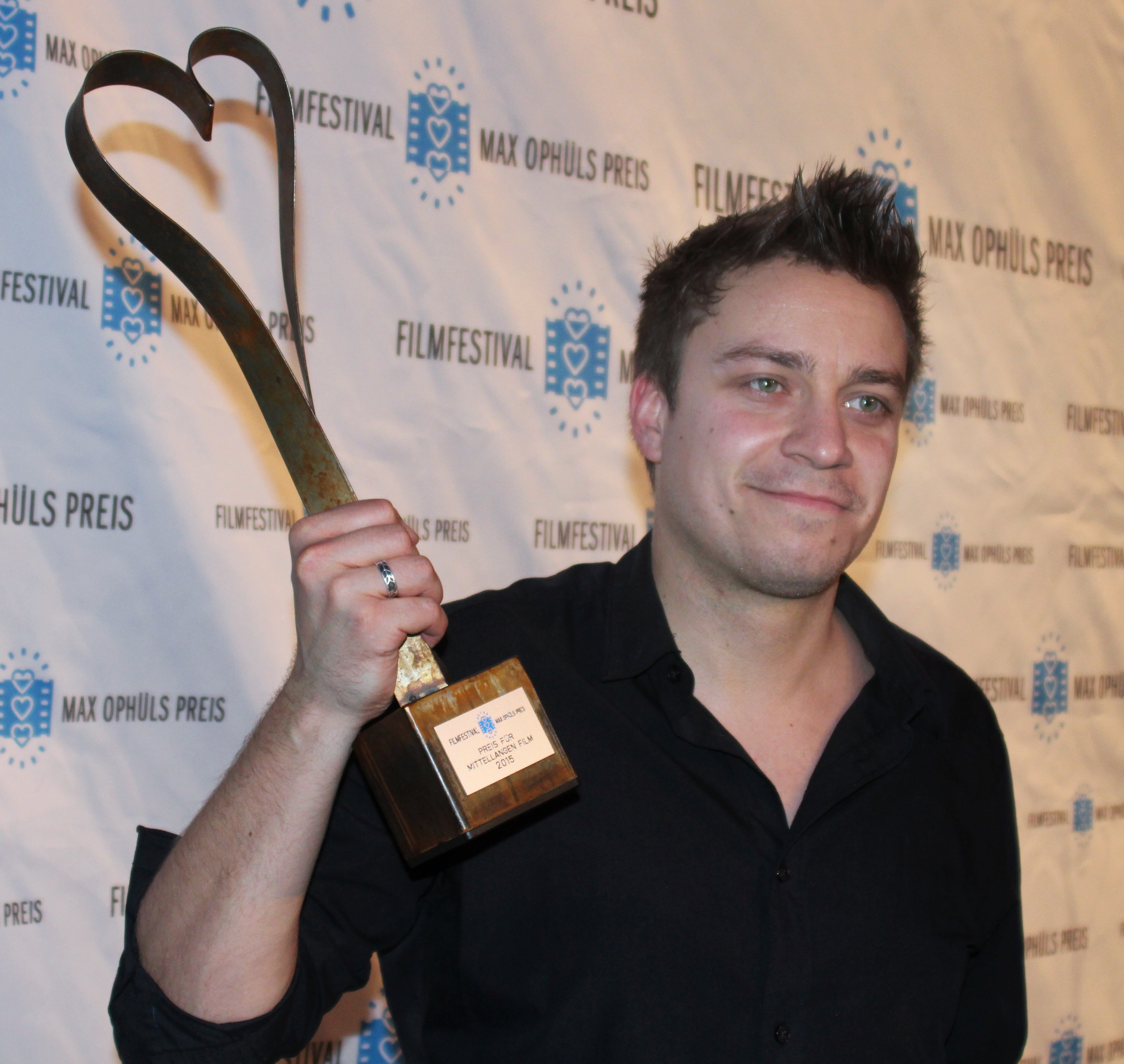 Patrick Vollrath nach der Preisverleihung des Max-Ophüls-Preis 2015